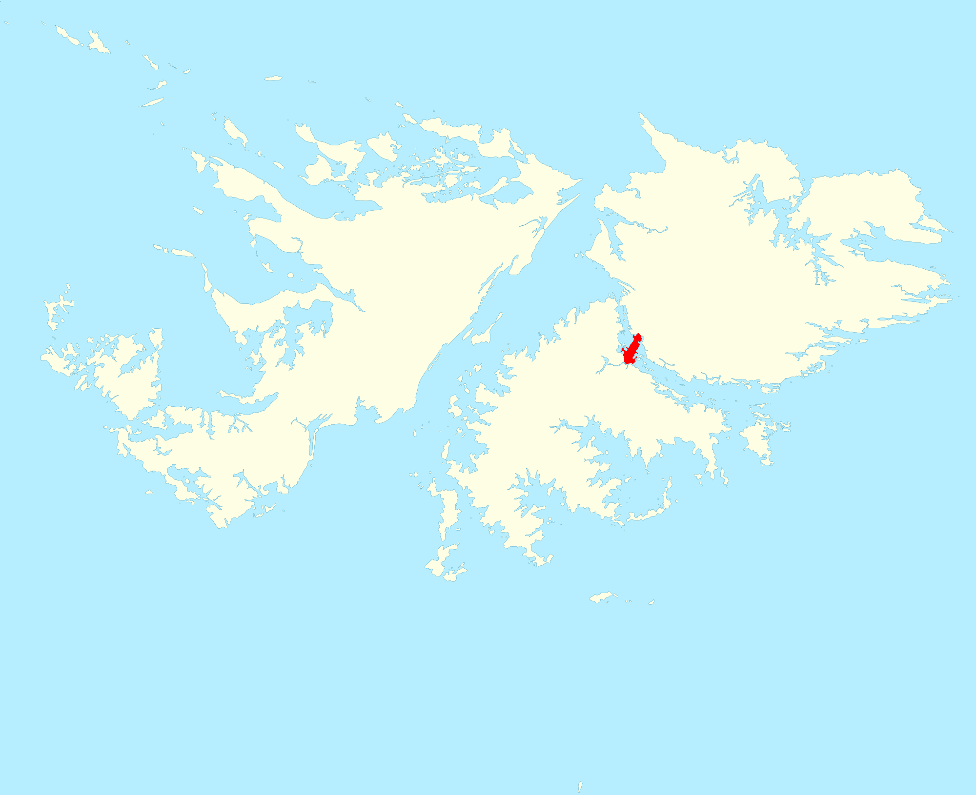 Mapa del istmo de Darwin en las islas Malvinas